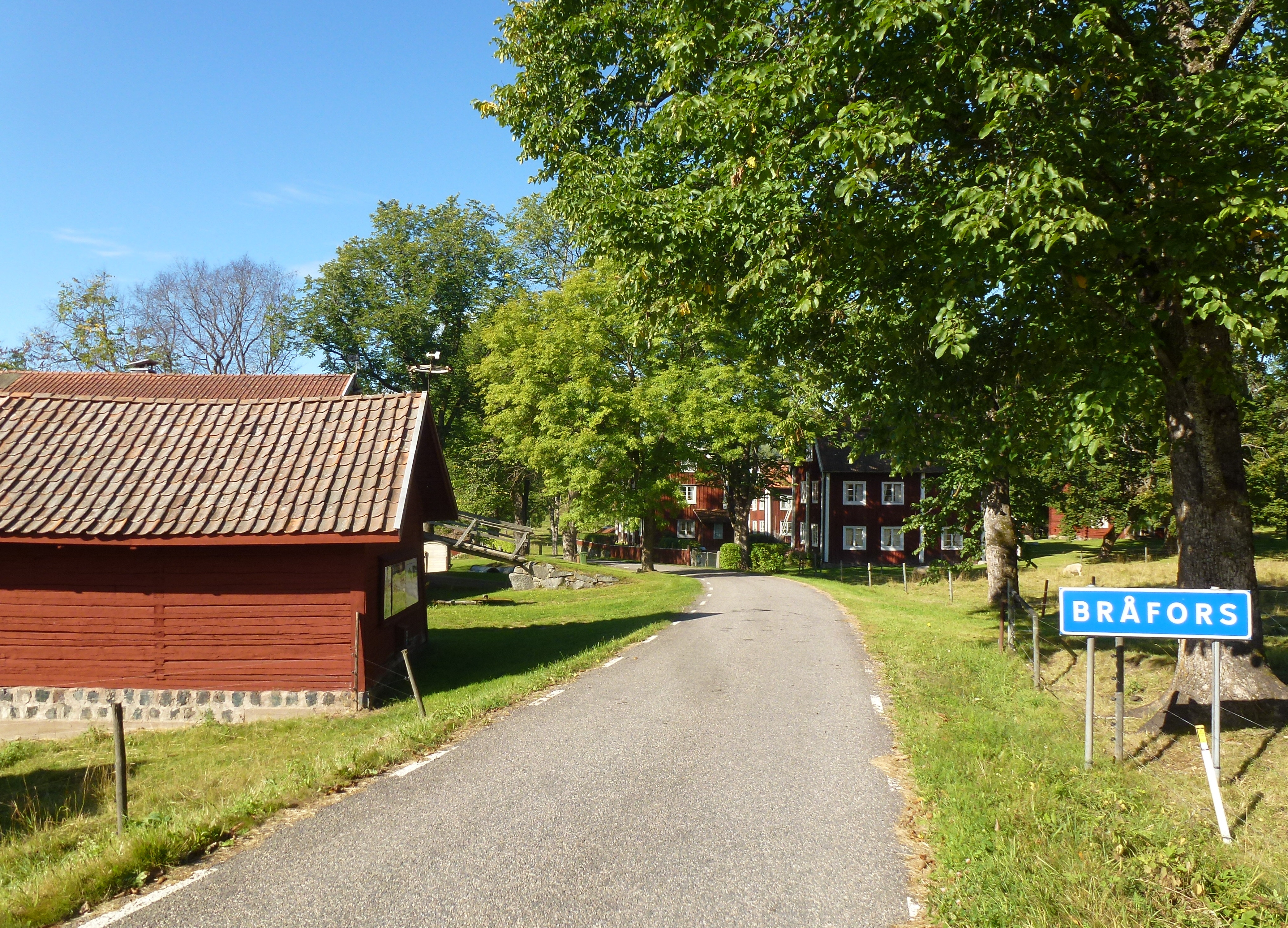 Bråfors bergsmansby vägskylt